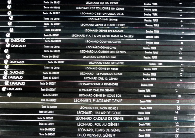 Collection Léonard est un génie.